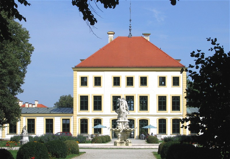 Schloss Fuerstenried in Muenchen, Gartenseite